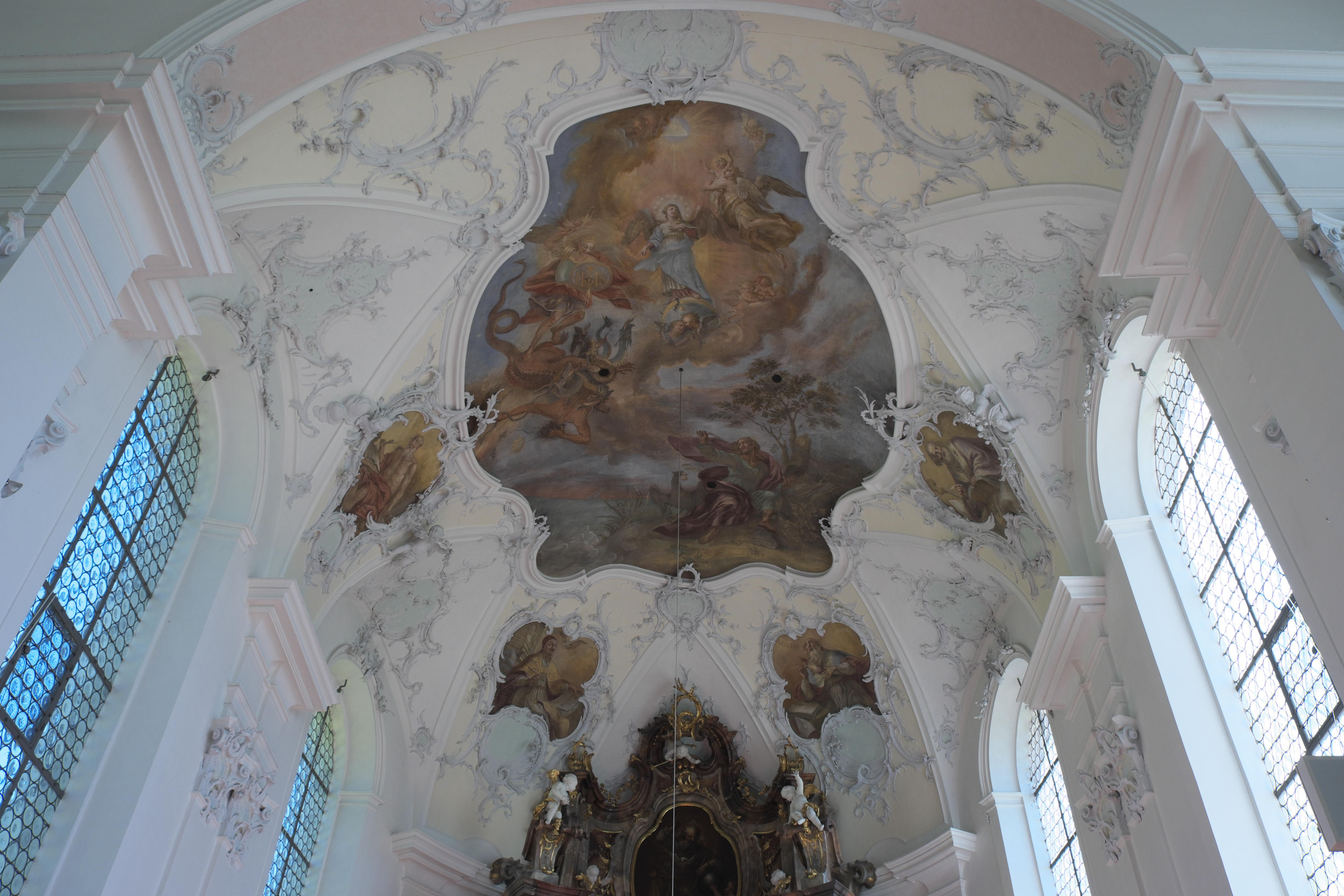 Katholische Pfarrkirche St. Johannes Baptist in Wessobrunn im Landkreis Weilheim-Schongau (Bayern/Deutschland), Stuck von Tassilo Zöpf, Deckenfresko im Chor von Johann Baptist Baader (Lechhansl), von 1758/59; Darstellung: Visionen der Apokalypse des Johannes von Patmos, in den Kartuschen die vier Kirchenväter